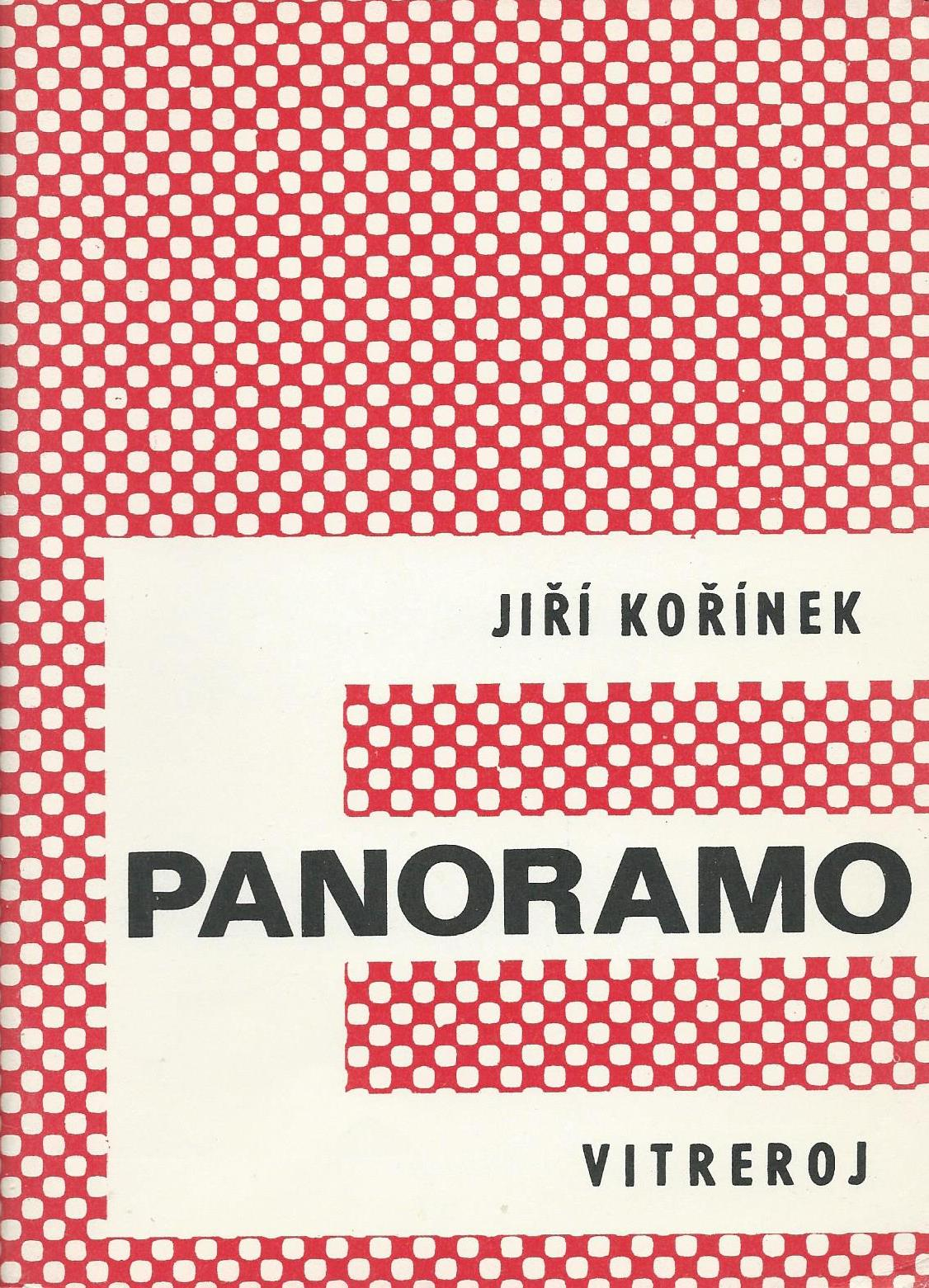 kovrilo de "Vitreroj", 1976